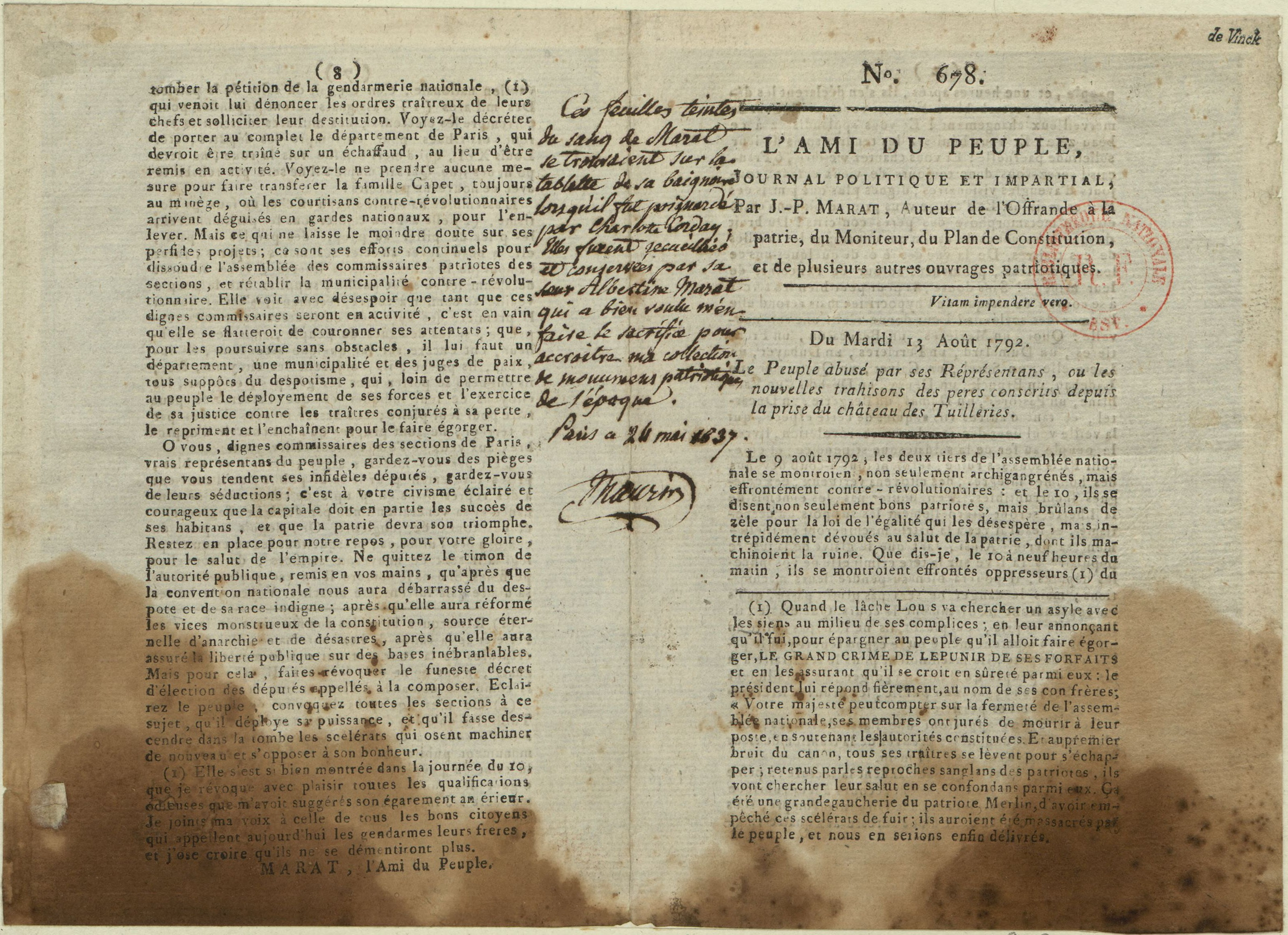 A copy of "L'Ami du peuple", stained with the blood of Marat, Bibliothèque Nationale, Paris